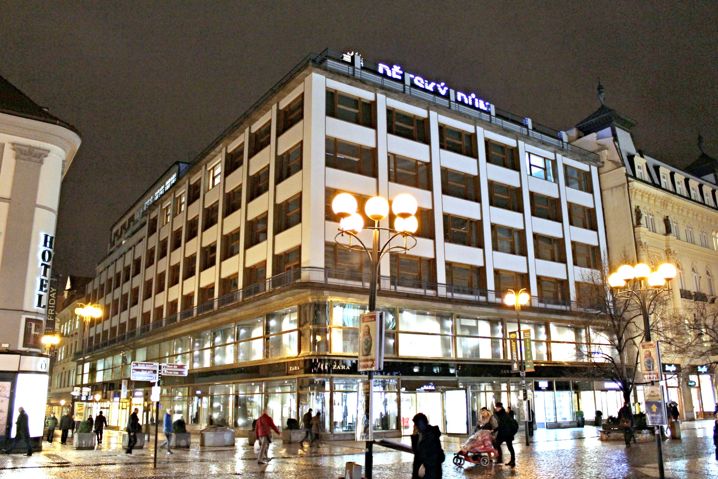 Na příkopě - Dětský dům